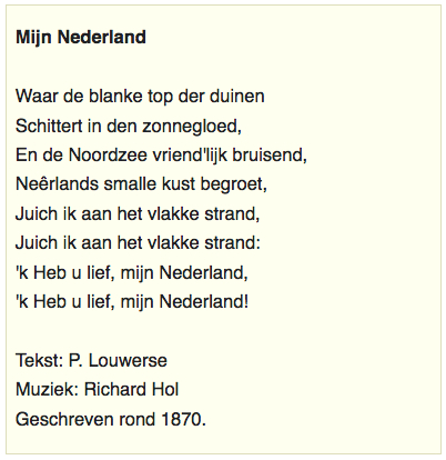 P. Louwerse (1840-1908) en Richard Hol (1825-1904), tekst liedje 'Waar de blanke top der duinen' (ca. 1870). Opgenomen in het liedboek "Kun je nog zingen, zing dan mee" (1906).